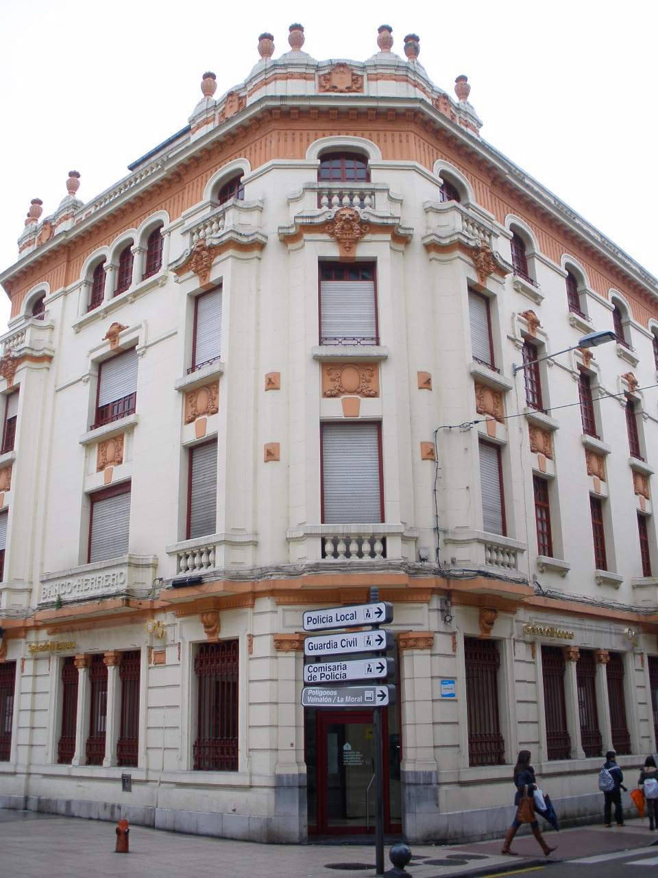 Paisaje urbano en Sama de Langreo (Asturias)